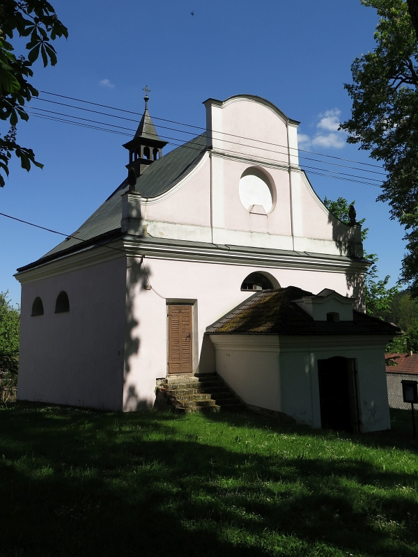 Kostel svatého Marka, Těchobuz.